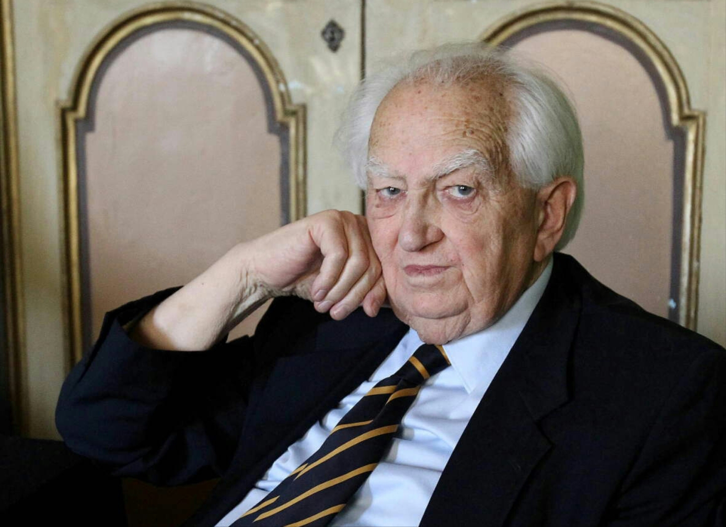 Leonello Radi (1930-2017)